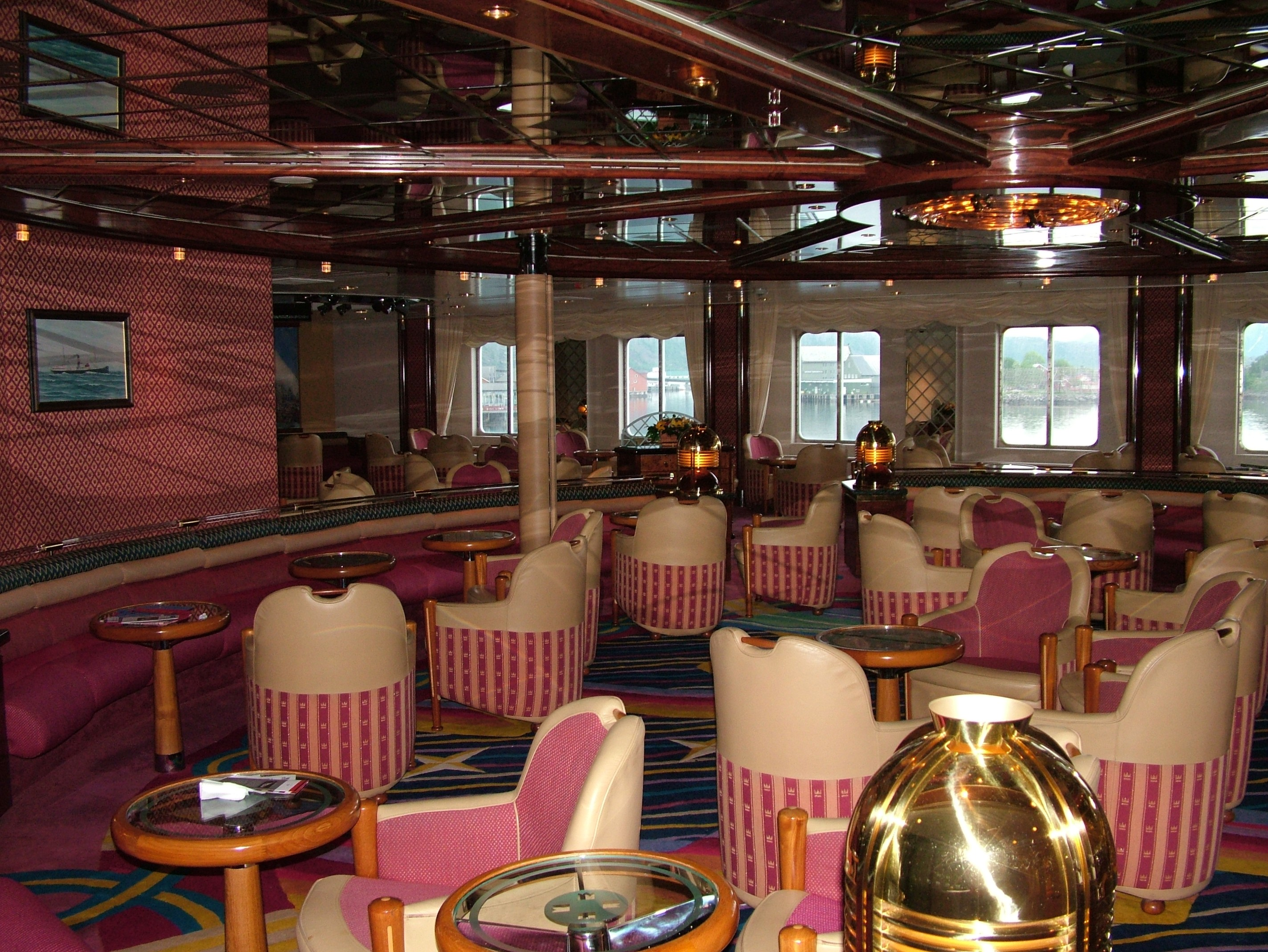 MS Kong Harald, ein Hurtigruten Schiff, die Bar